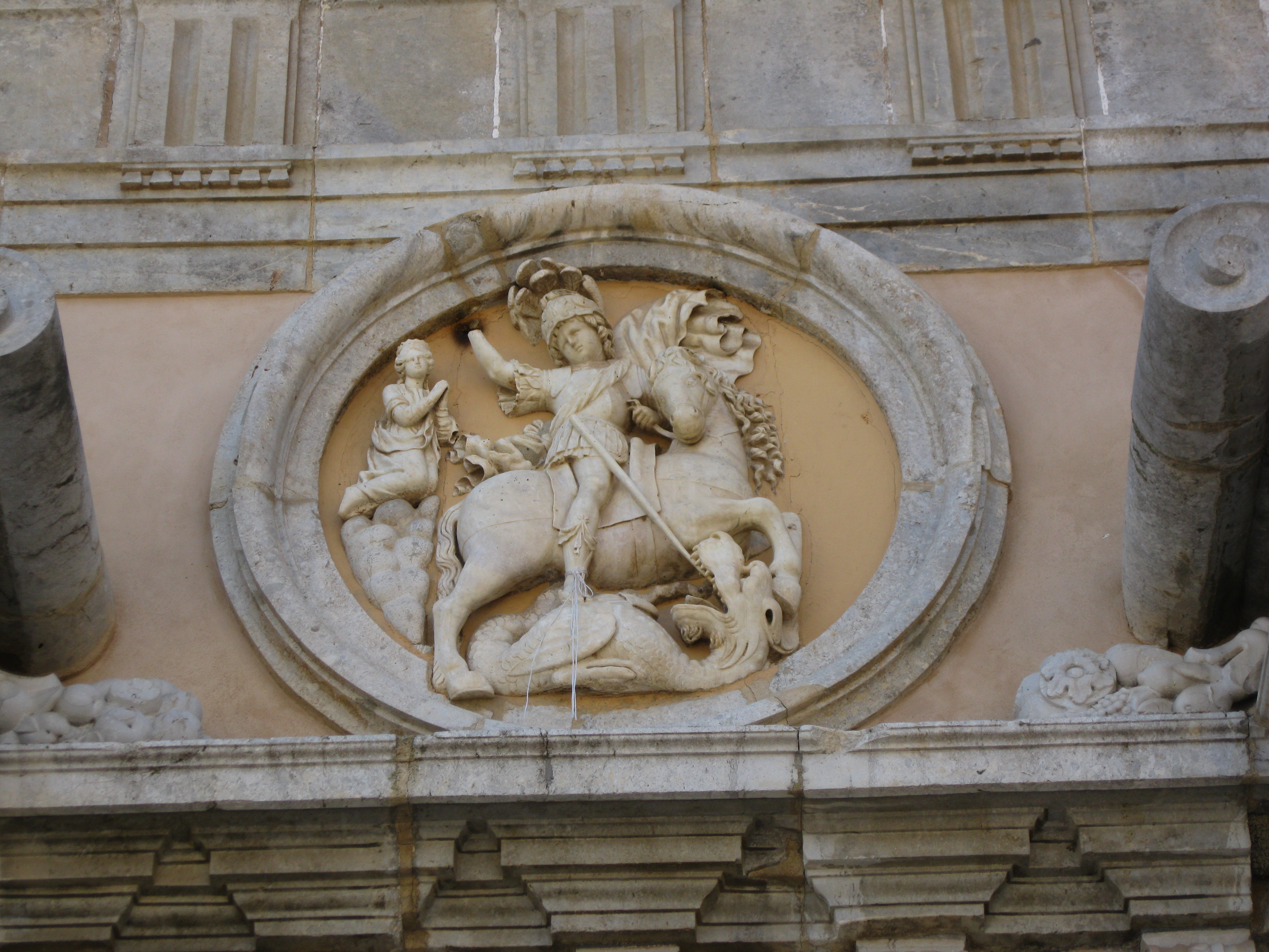 Il duomo di San Giorgio Martire a Caccamo, nella città metropolitana di Palermo.